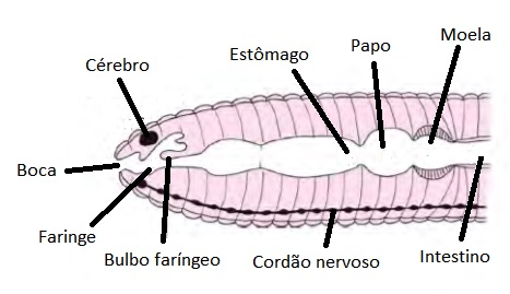 sistema digestório de minhoca